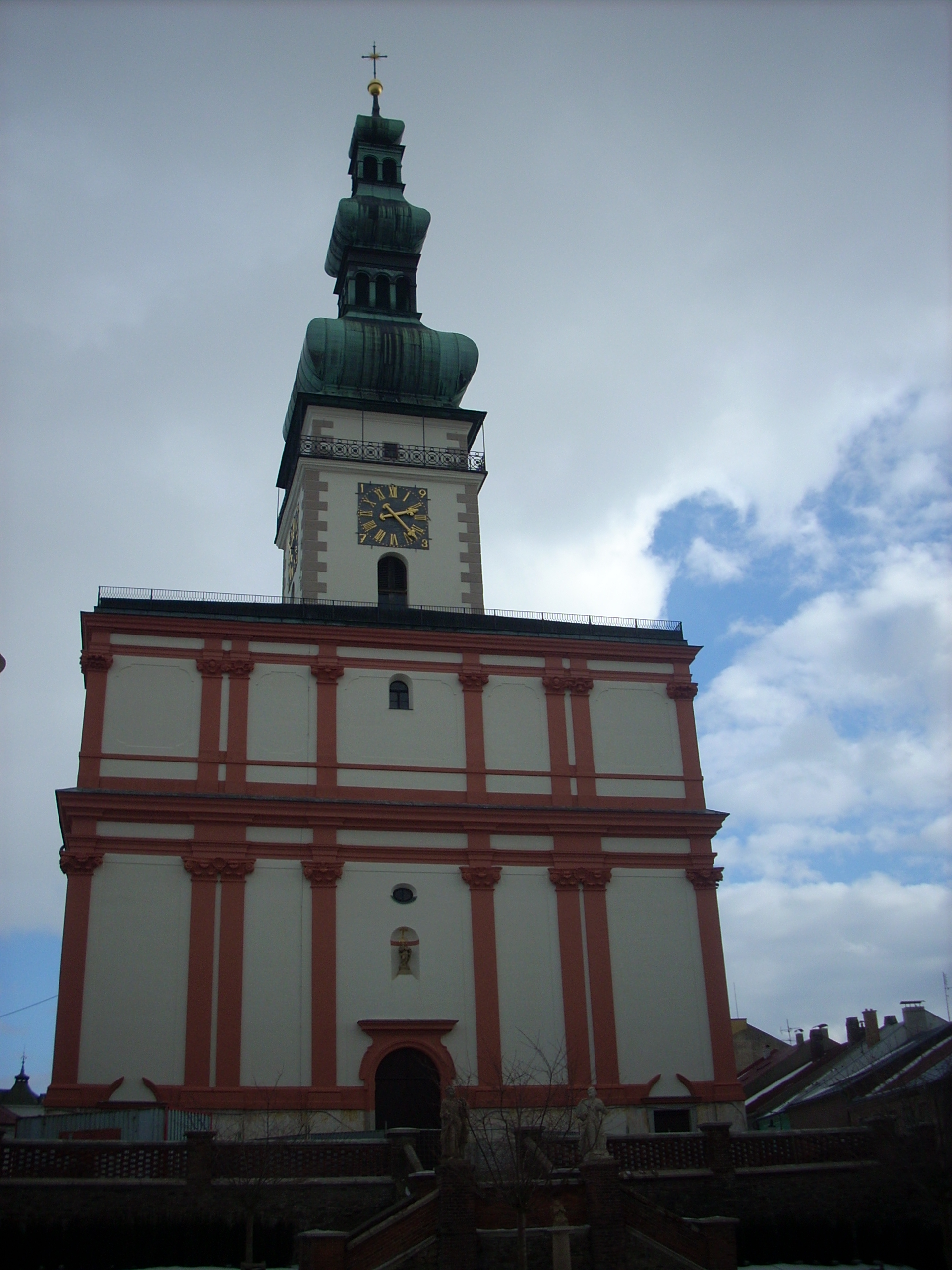 Kostel Nanebevzetí Panny Marie, Polná, stav 2012